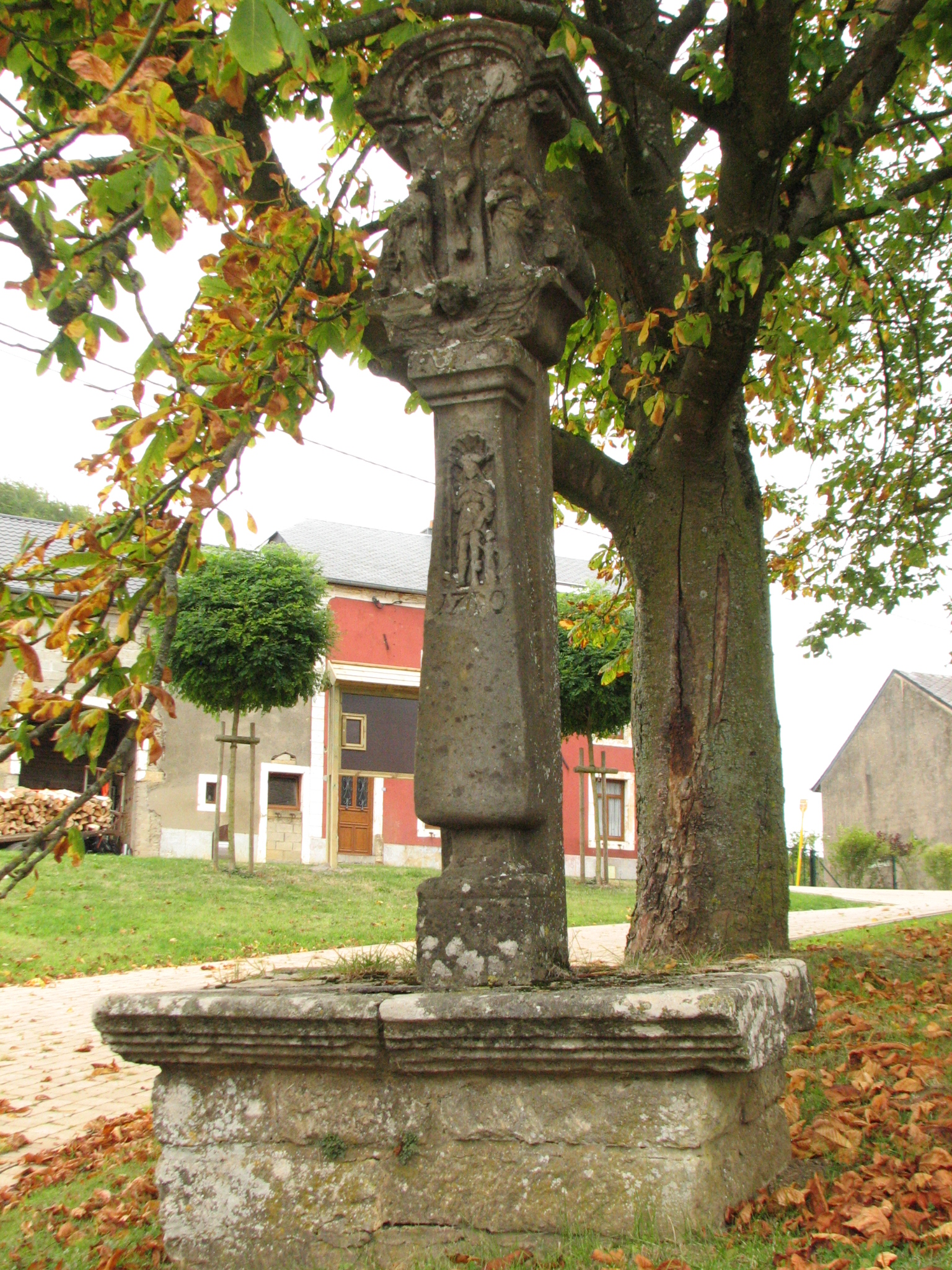 Calvaire situé devant l'église à Habergy